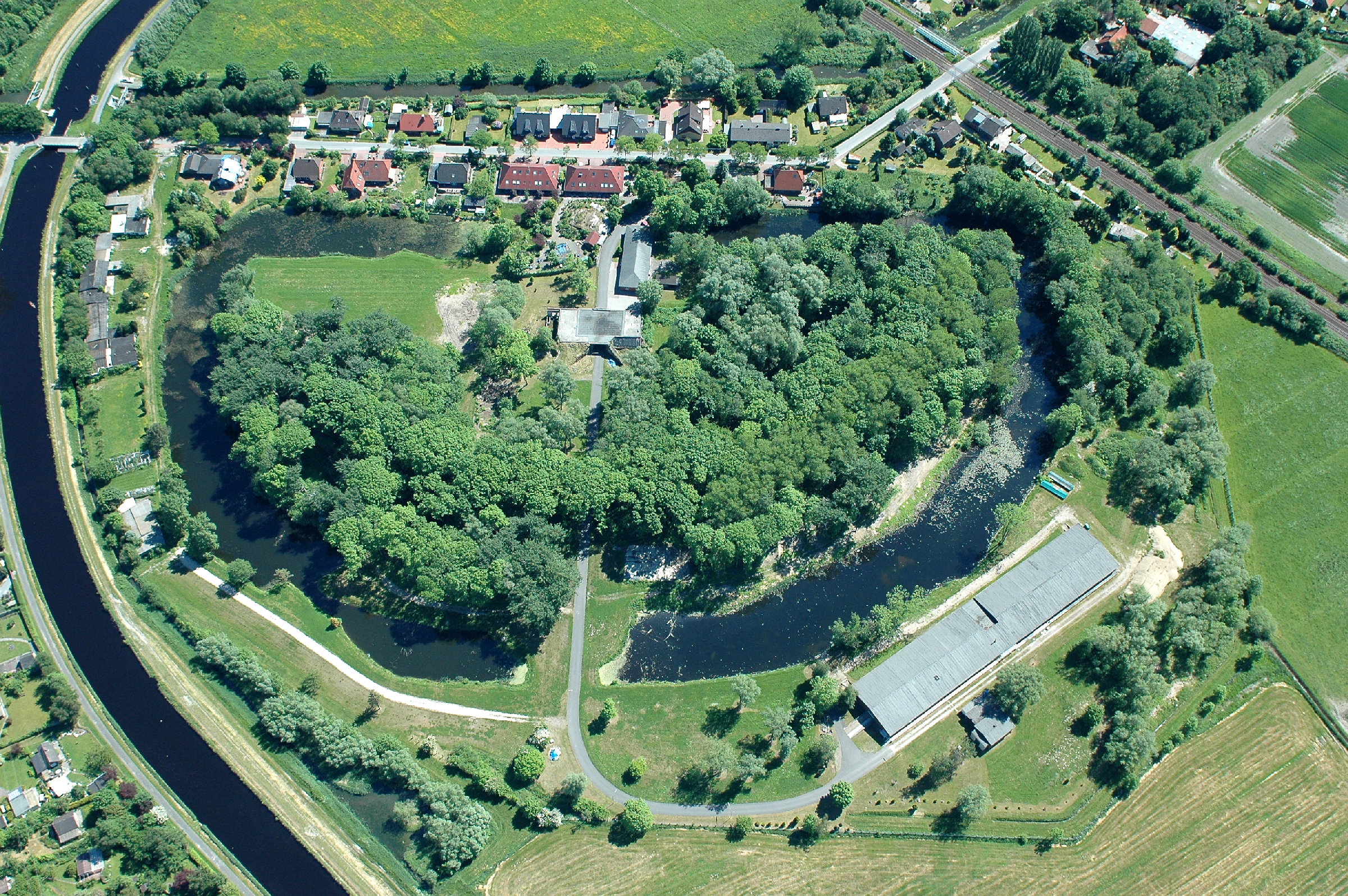 Fotoflug vom Flugplatz Nordholz-Spieka über Cuxhaven und Wilhelmshaven